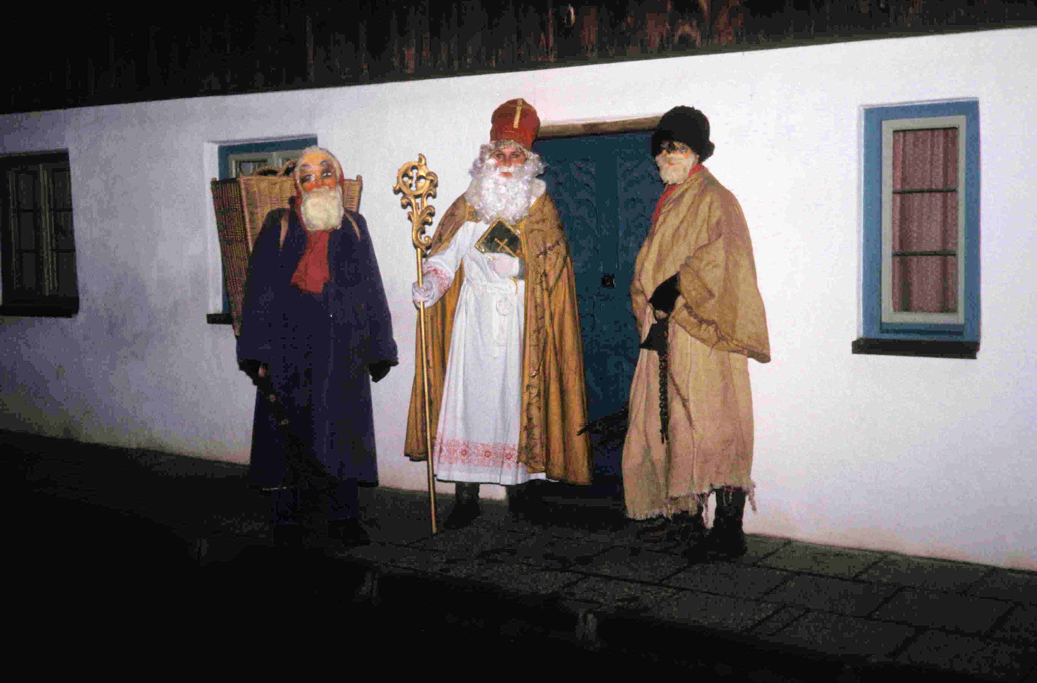 Haunzenbergersöll Nikolaus 1986 Krampus Knecht Ruprecht Hauseingang Straße 6. Dezember Kinder Bischof Kostüm